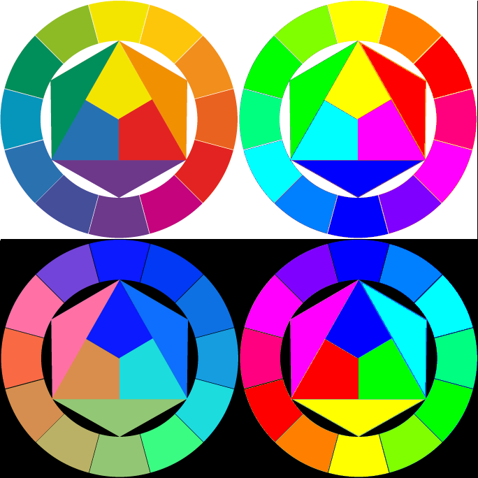 Étude du cercle chromatique de Johannes Itten